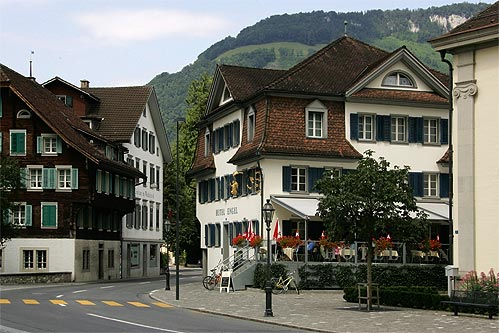 Stans: Hotel "Engel"